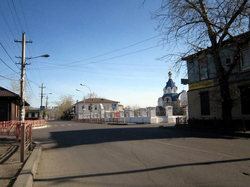 Улица Банзарова в Улан-Удэ.